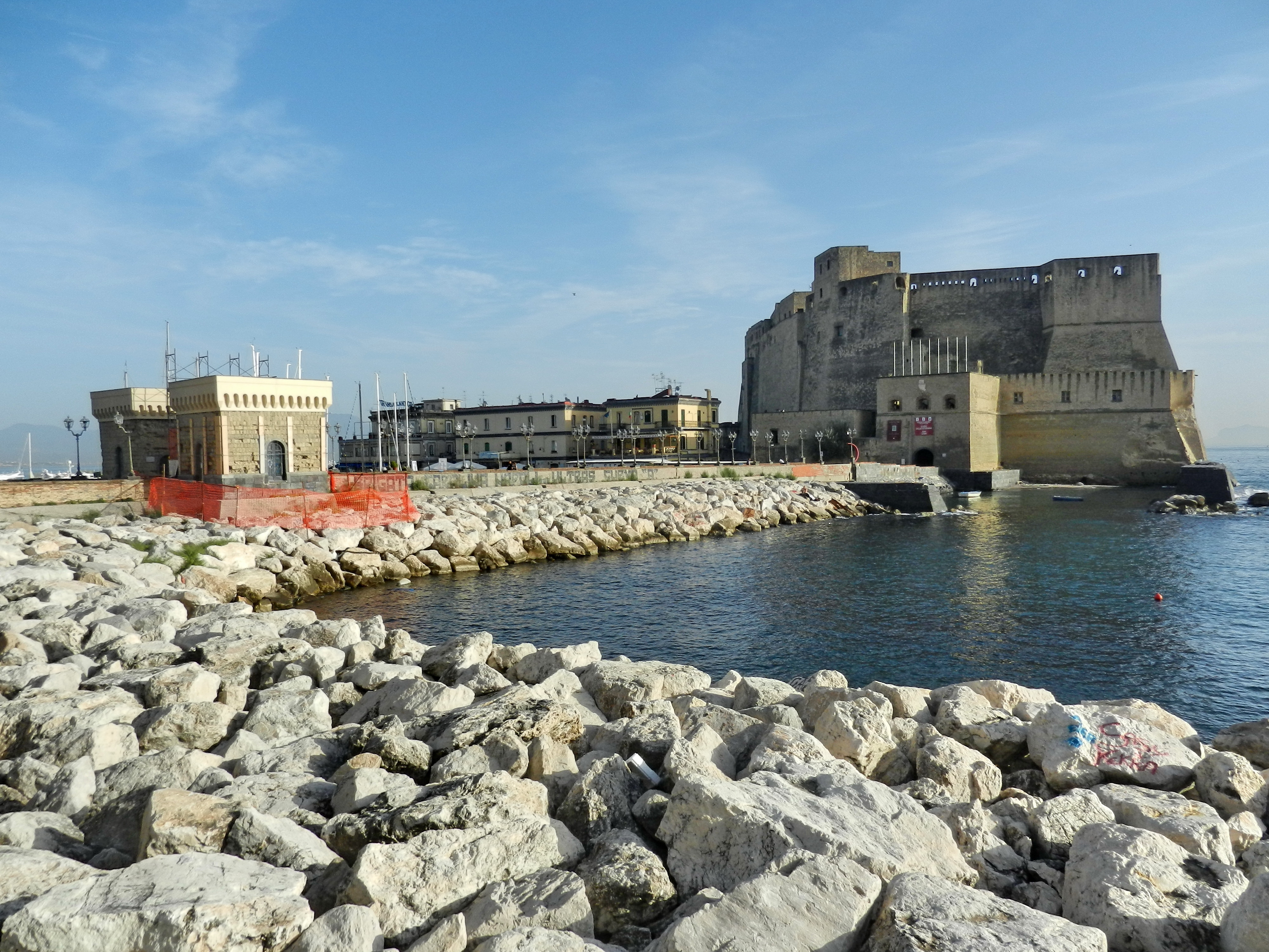 Neapol